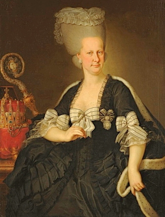 Erzherzogin Maria Elisabeth von Österreich (1743–1808) als Äbtissin des Damenstifts Innsbruck